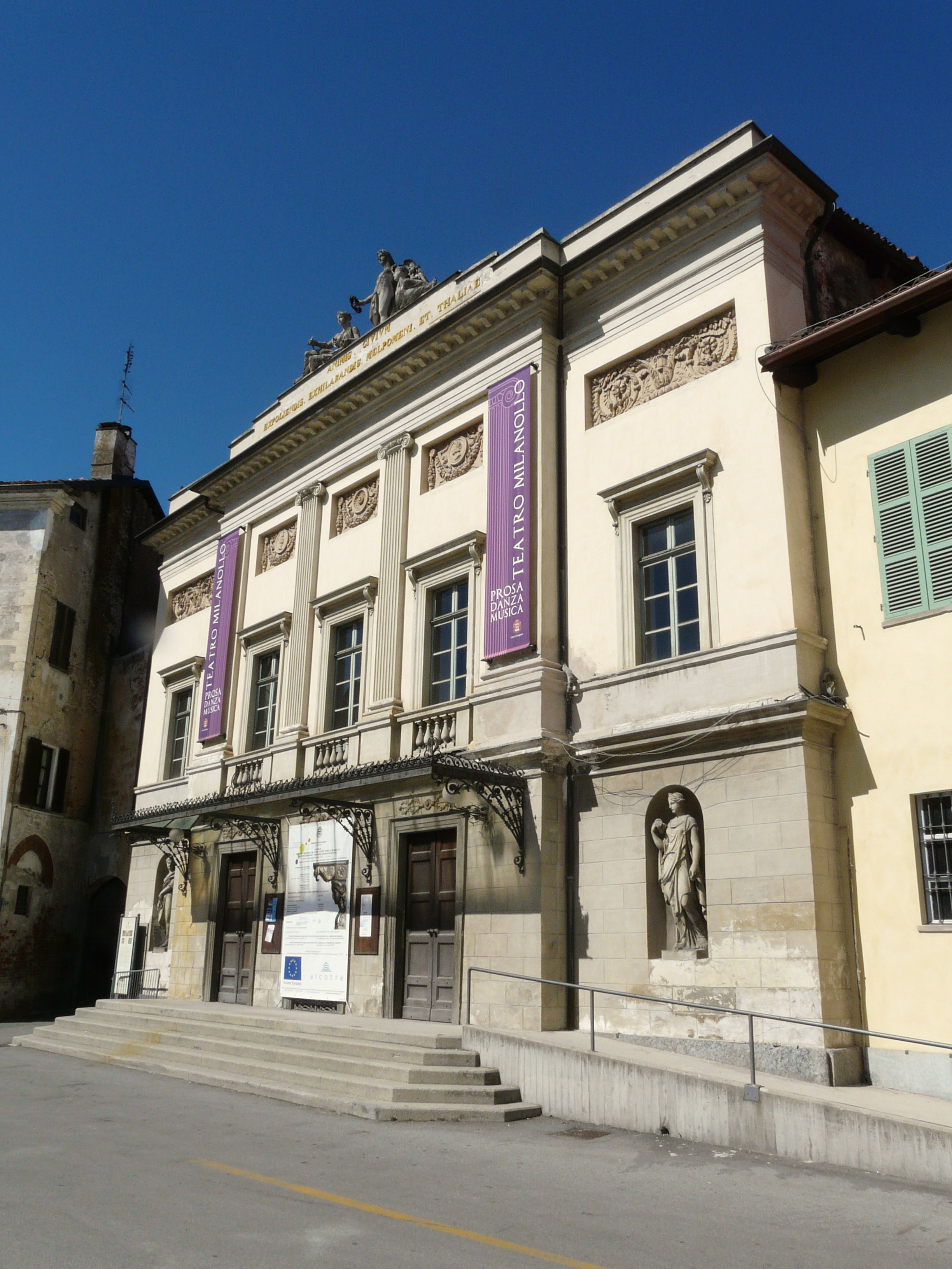 Teatro Milanollo, Savigliano, Piemonte, Italia